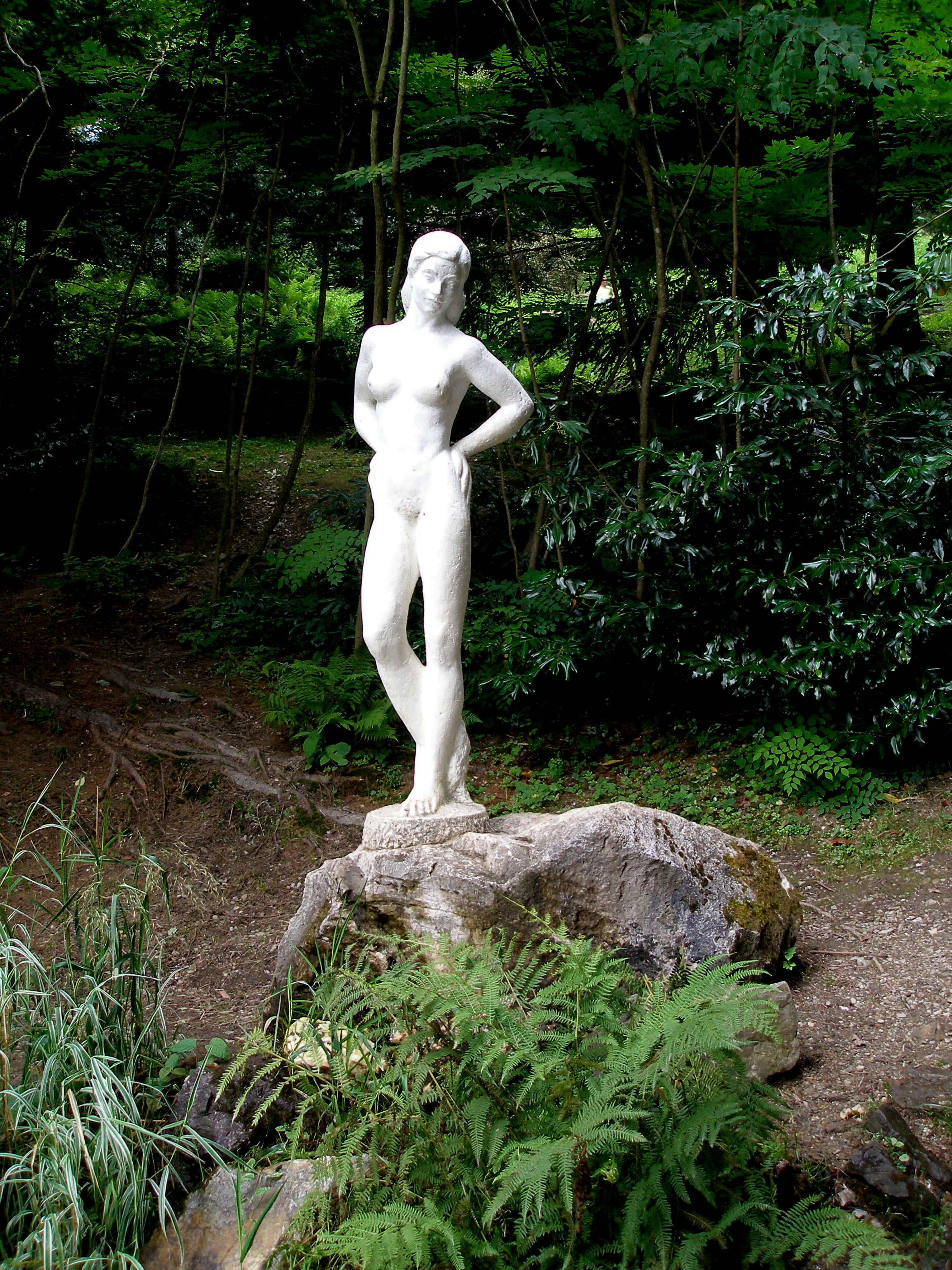 Kúpele Štós v obci Štós, okres Košice vidiek.